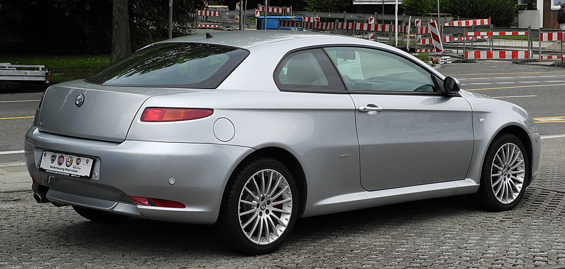 Alfa Romeo GT 1.8 TS 16V Progression